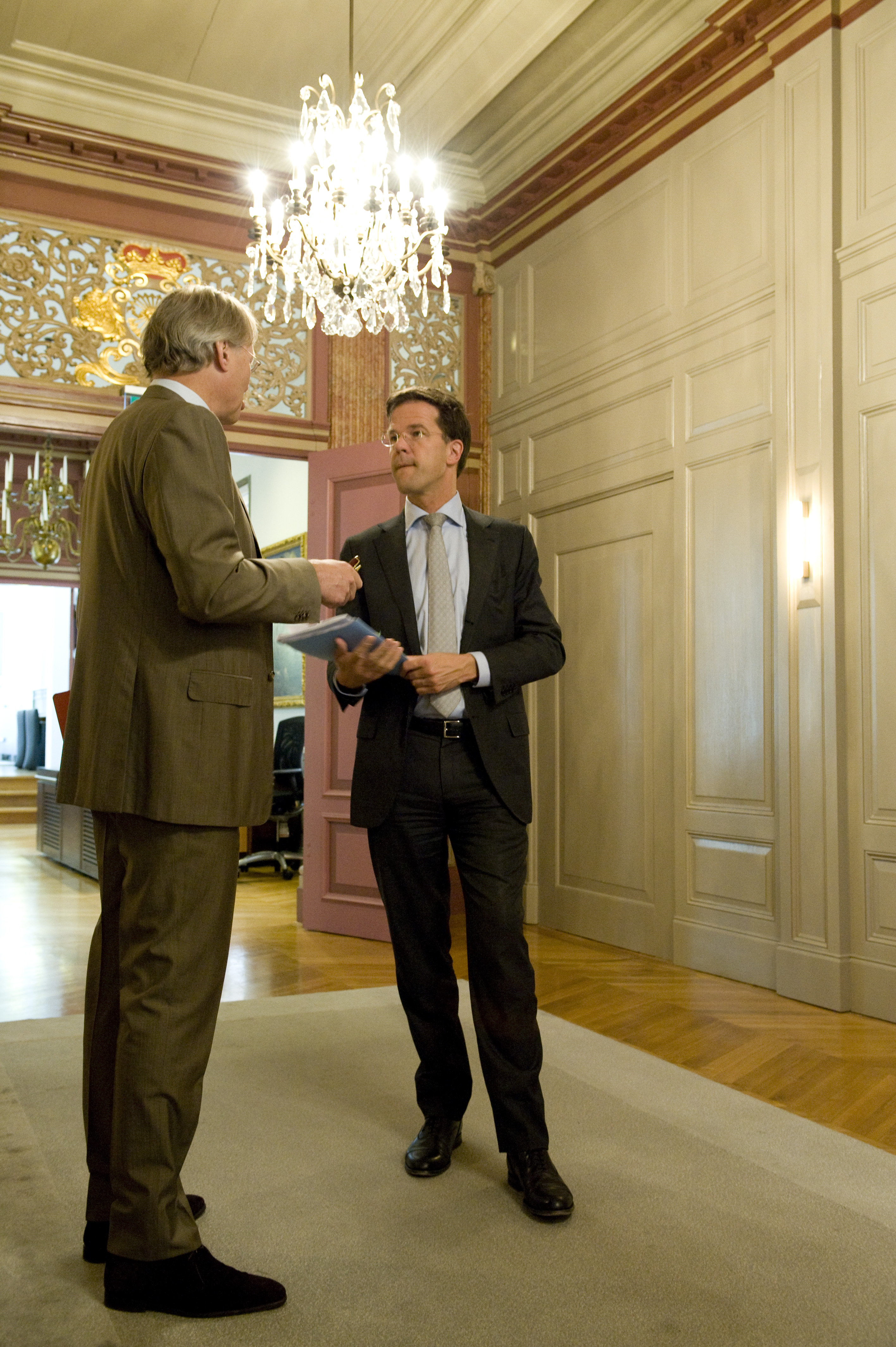 Minister-president Rutte wordt vlak voor het betreden van de Trêveszaal voor de wekelijkse ministerraad nog even door zijn woordvoerder bijgepraat over het laatste nieuws. In verband met Goede Vrijdag vergadert het kabinet deze week op donderdag en niet op vrijdag.